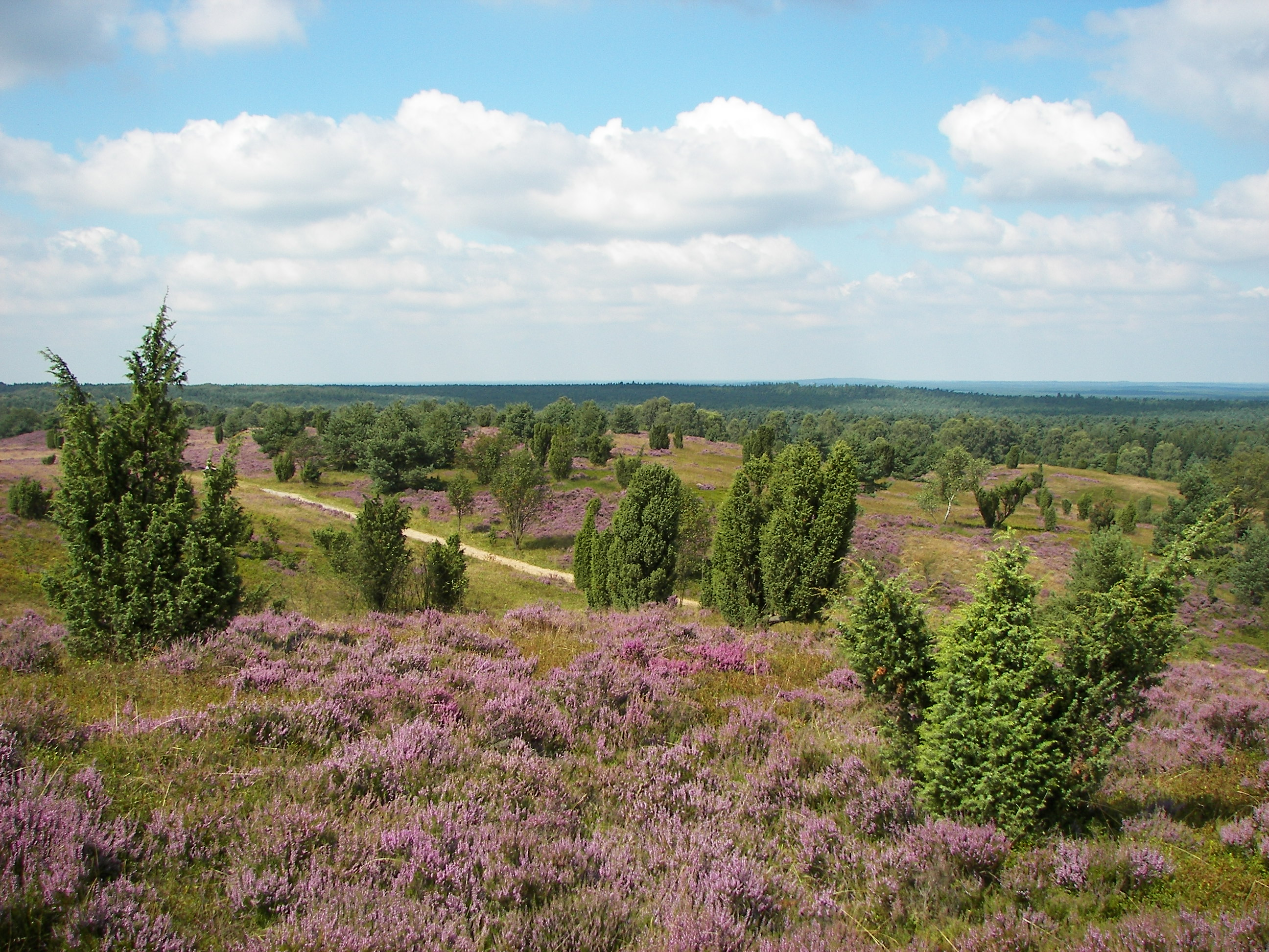 Blick vom Wilseder Berg